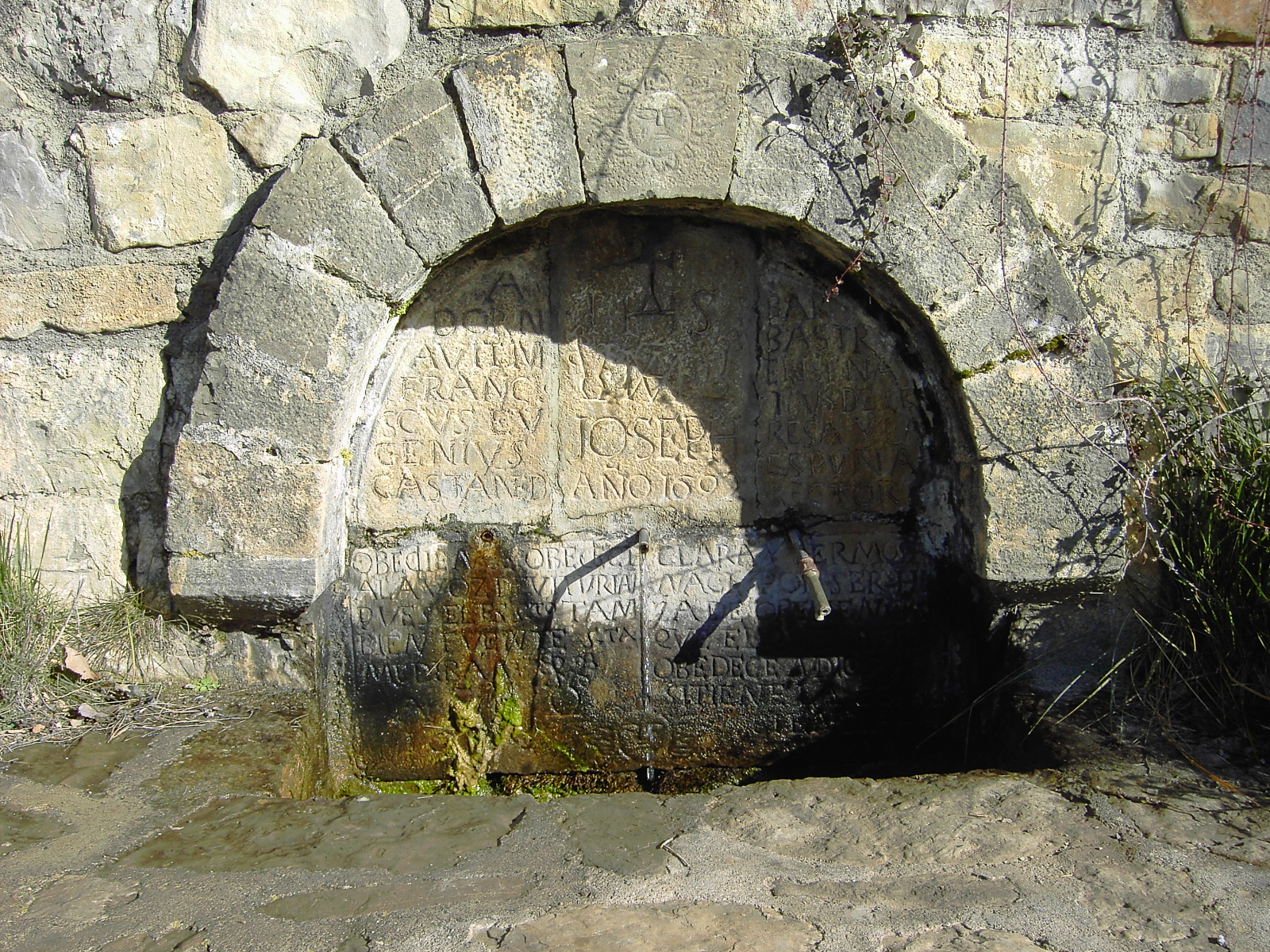 La Fuente de los Tres Caños, en el conjunto eremitorio de La Fuen Santa, en el municipio de Laspuña (Huesca, España).